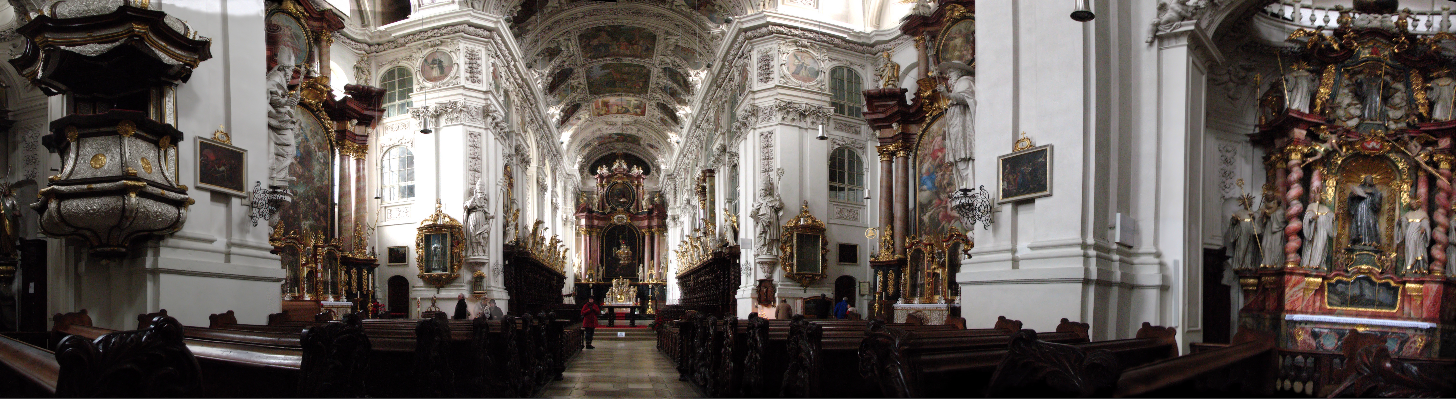 Stiftsbasilika Waldsassen Innenraum Panoramabild mit Altar